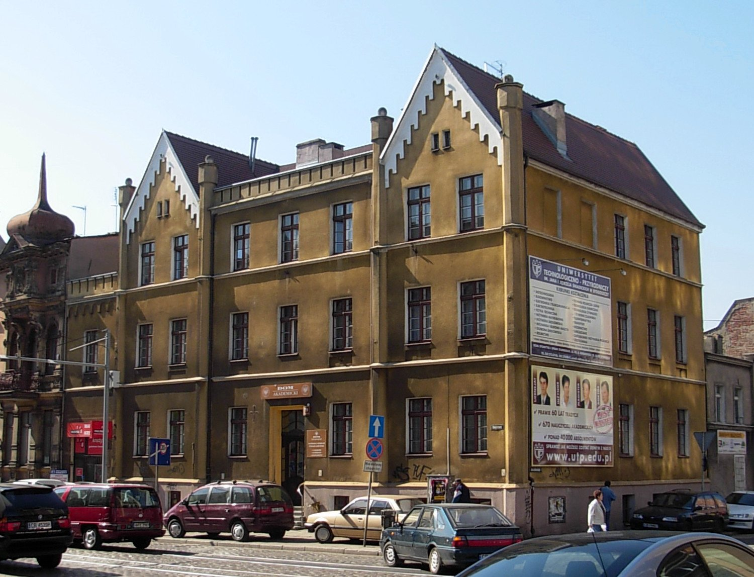 Kamienica ul. Dworcowa 79 w Bydgoszczy